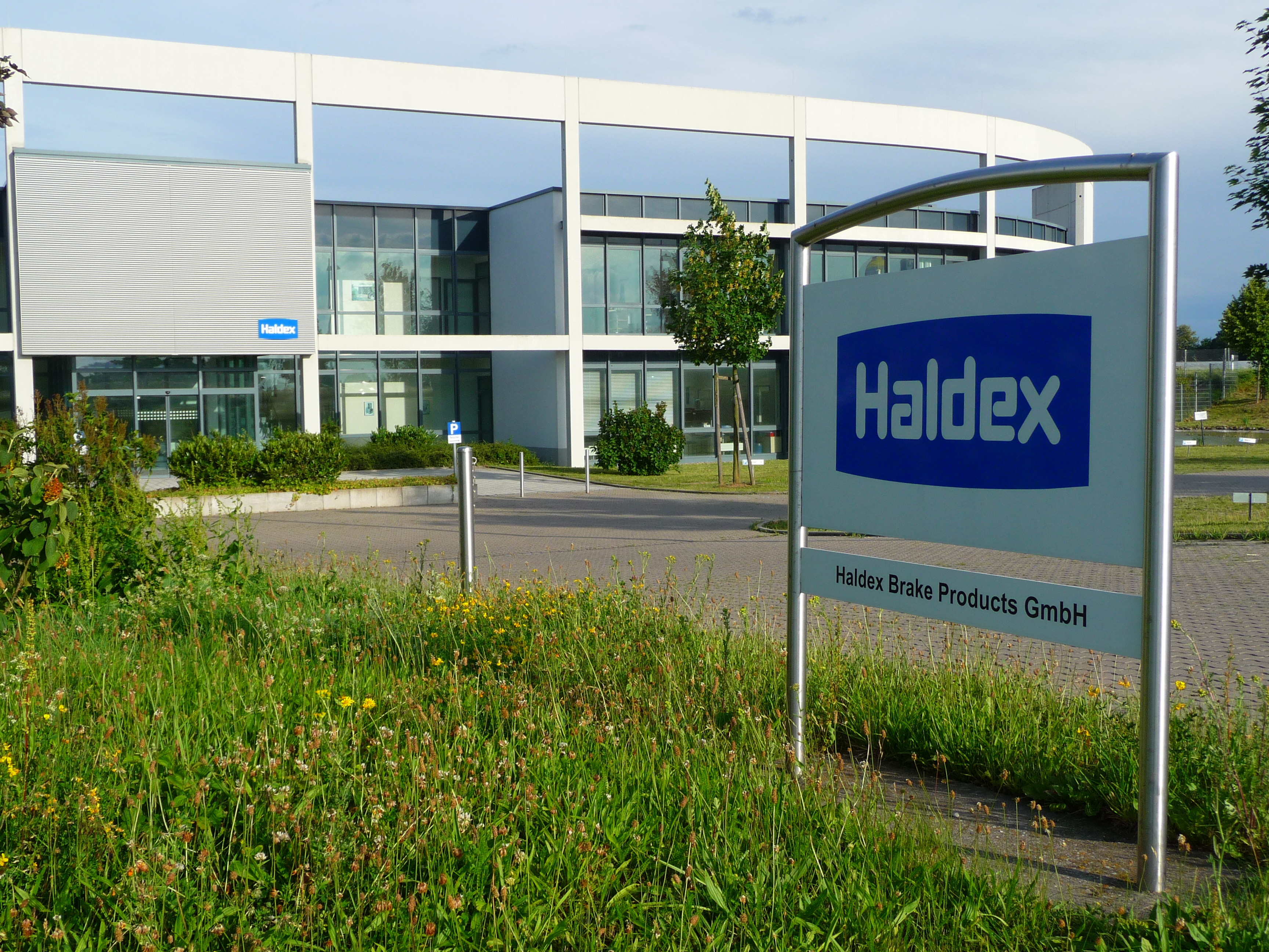 Werk der Firma Haldex Brake Products GmbH in Heidelberg-Wieblingen